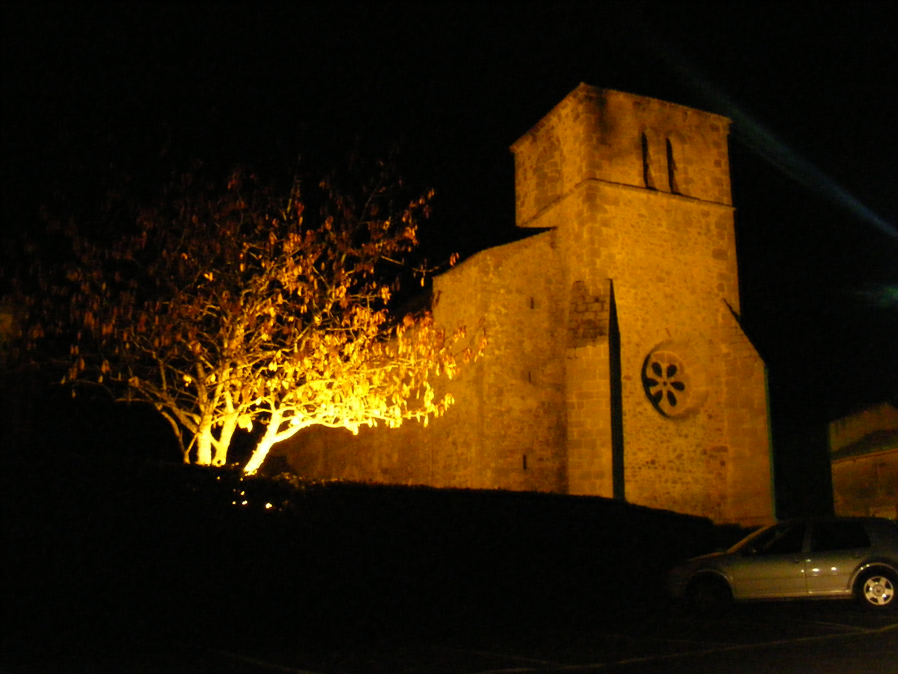 L'une des plus anciennes église du Canton, L'eglise St Pierre-St Paul de Voultegon